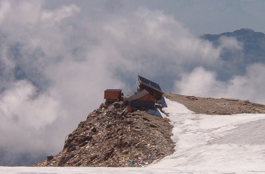 Rifugio Quintino Sella al Felik - Valle di Gressoney- Valle d'Aosta - Italia